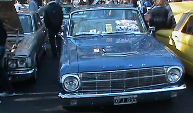 Ford Falcon de mediados de los 60's, período 1965 a 1970